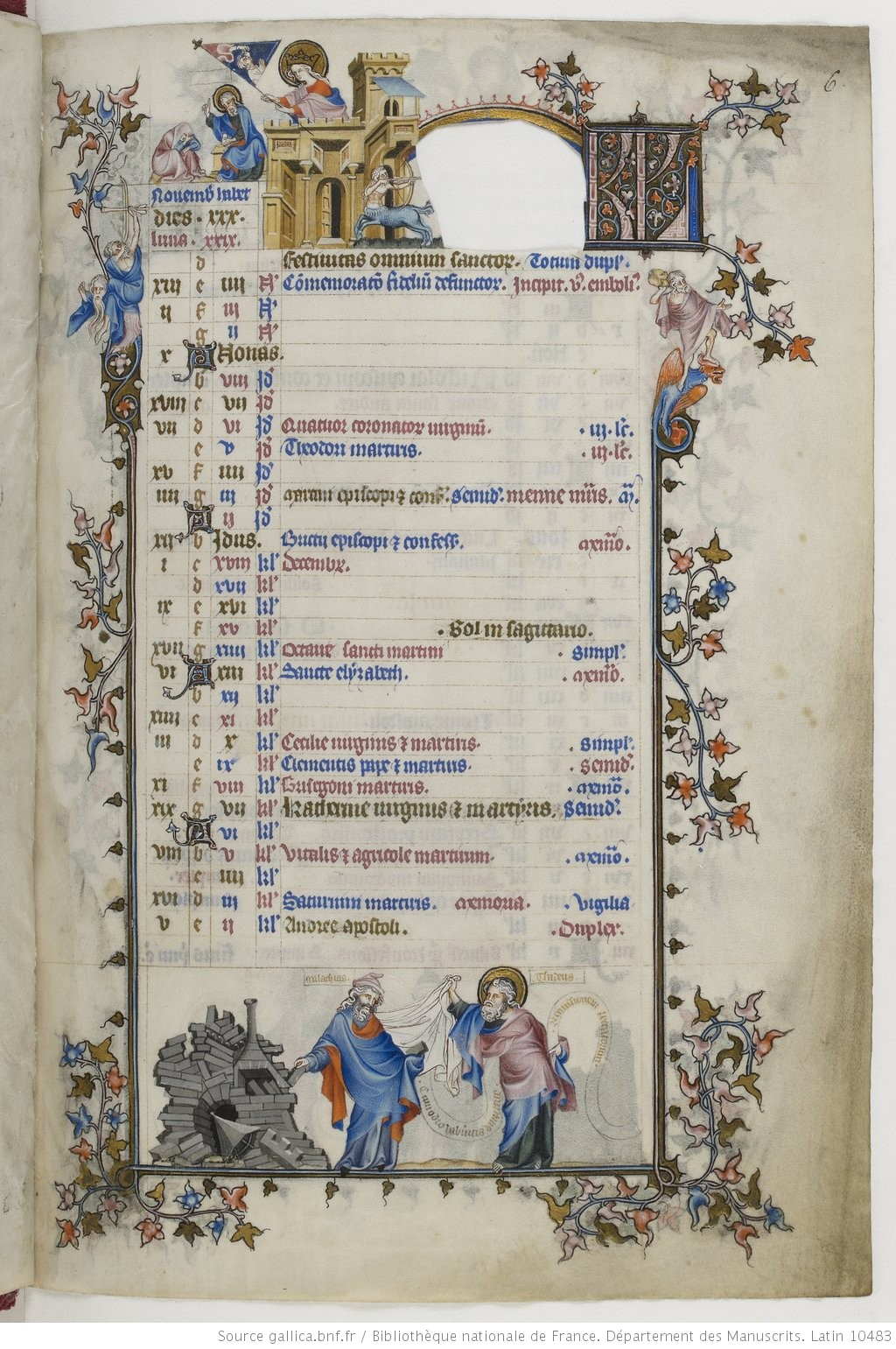 Bréviaire de Belleville Jean Pucelle t.1 6r